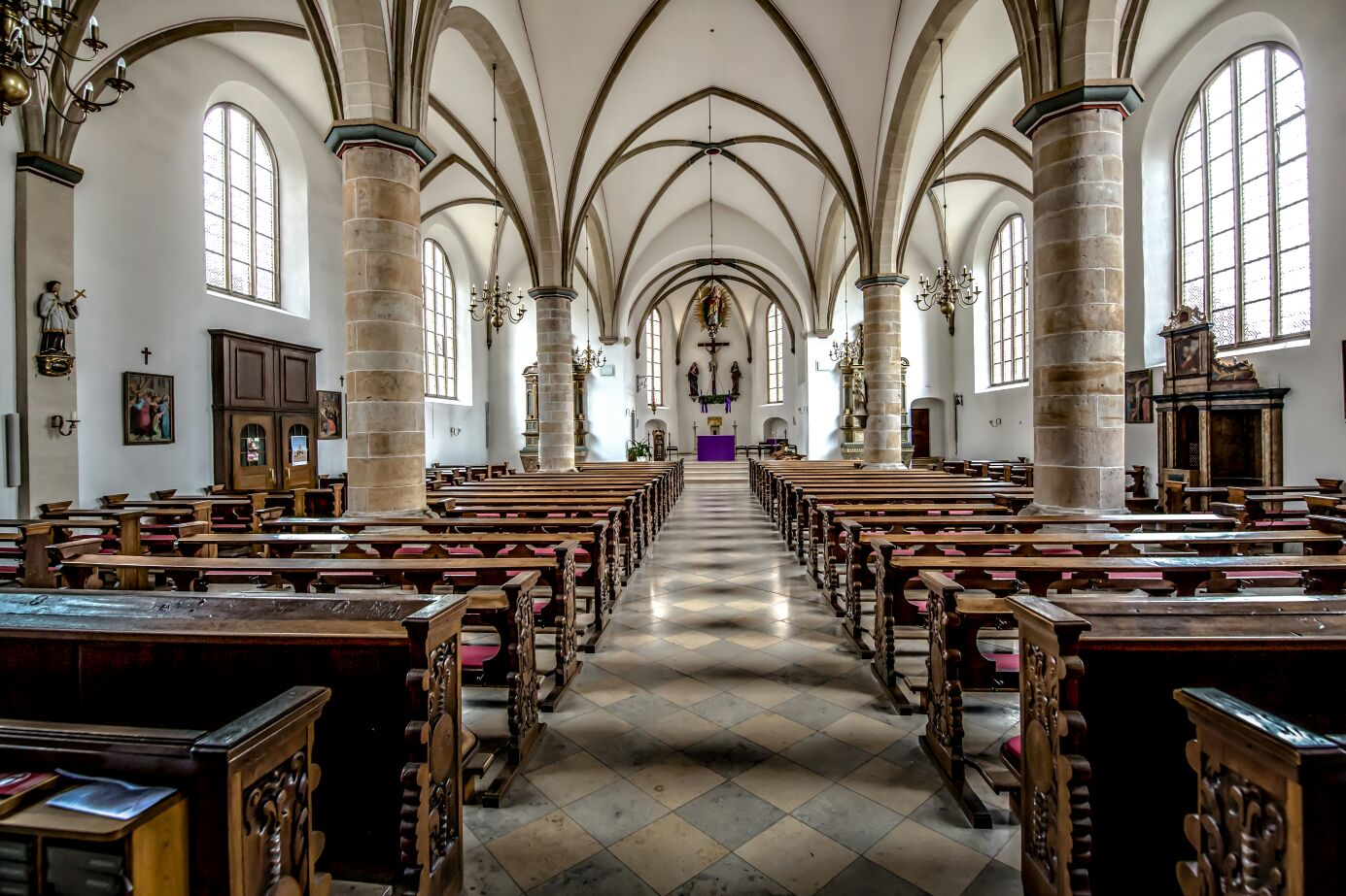 Die Kirche mit dem Blick von der Eingangstür zum Altar.